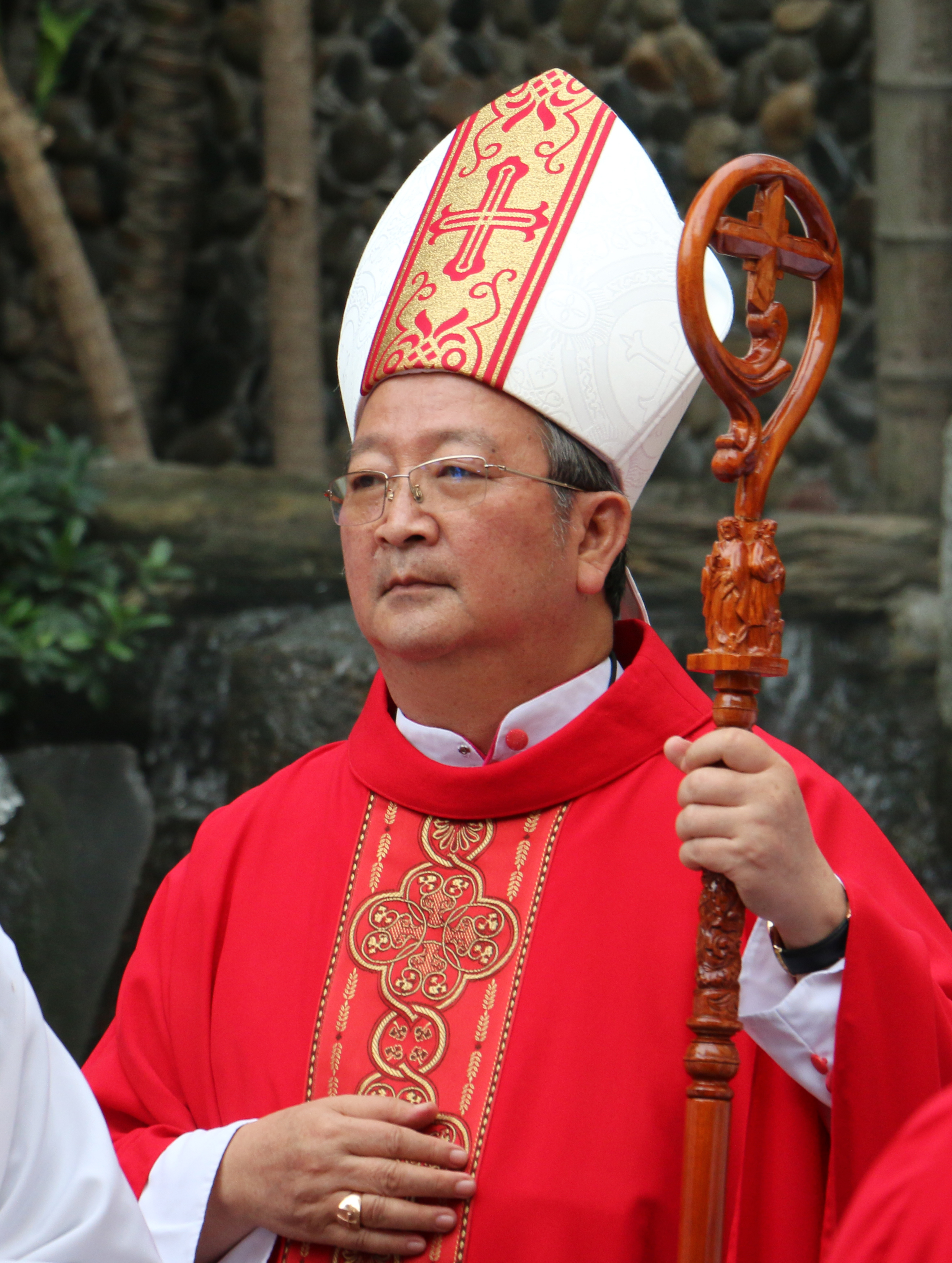 Das Foto zeigt Bischof Paul Bùi Van Ðoc bei einer Firmung in Ho-Chi-Minh-Stadt